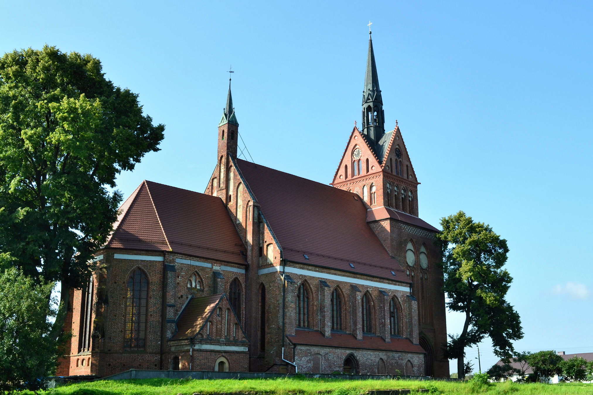 Kościół w Chociwlu